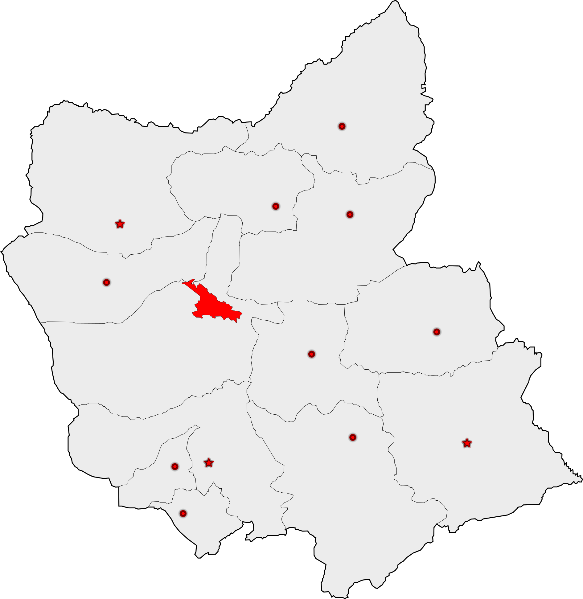 حوزه‌های انتخاباتی مجلس شورای اسلامی در استان آذربایجان شرقی